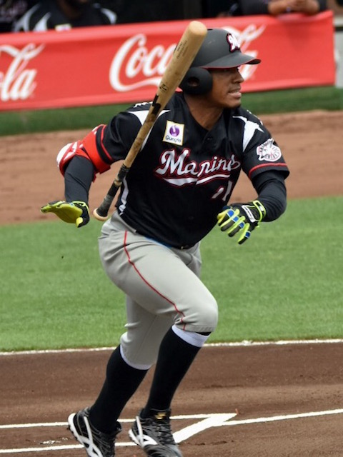 2017年6月24日、ほっともっとフィールド神戸にて撮影